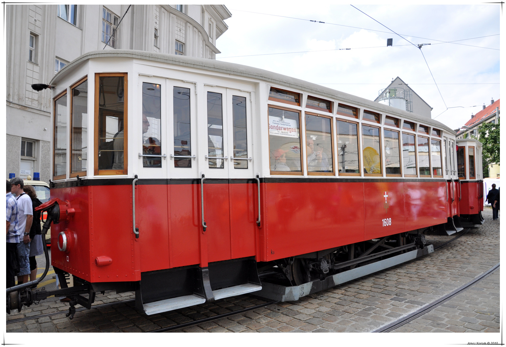 Tramwaytag 2010 053